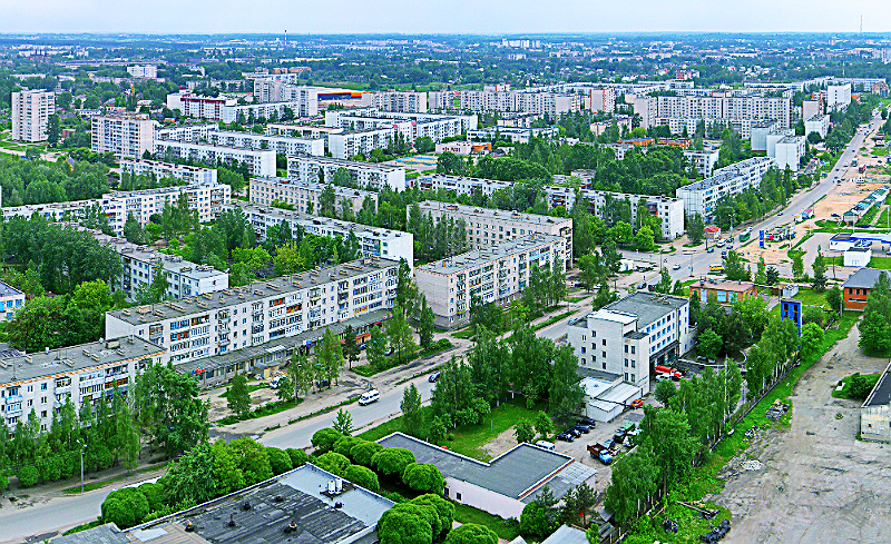 Панорама жилого района Дружба (г. Великие Луки)